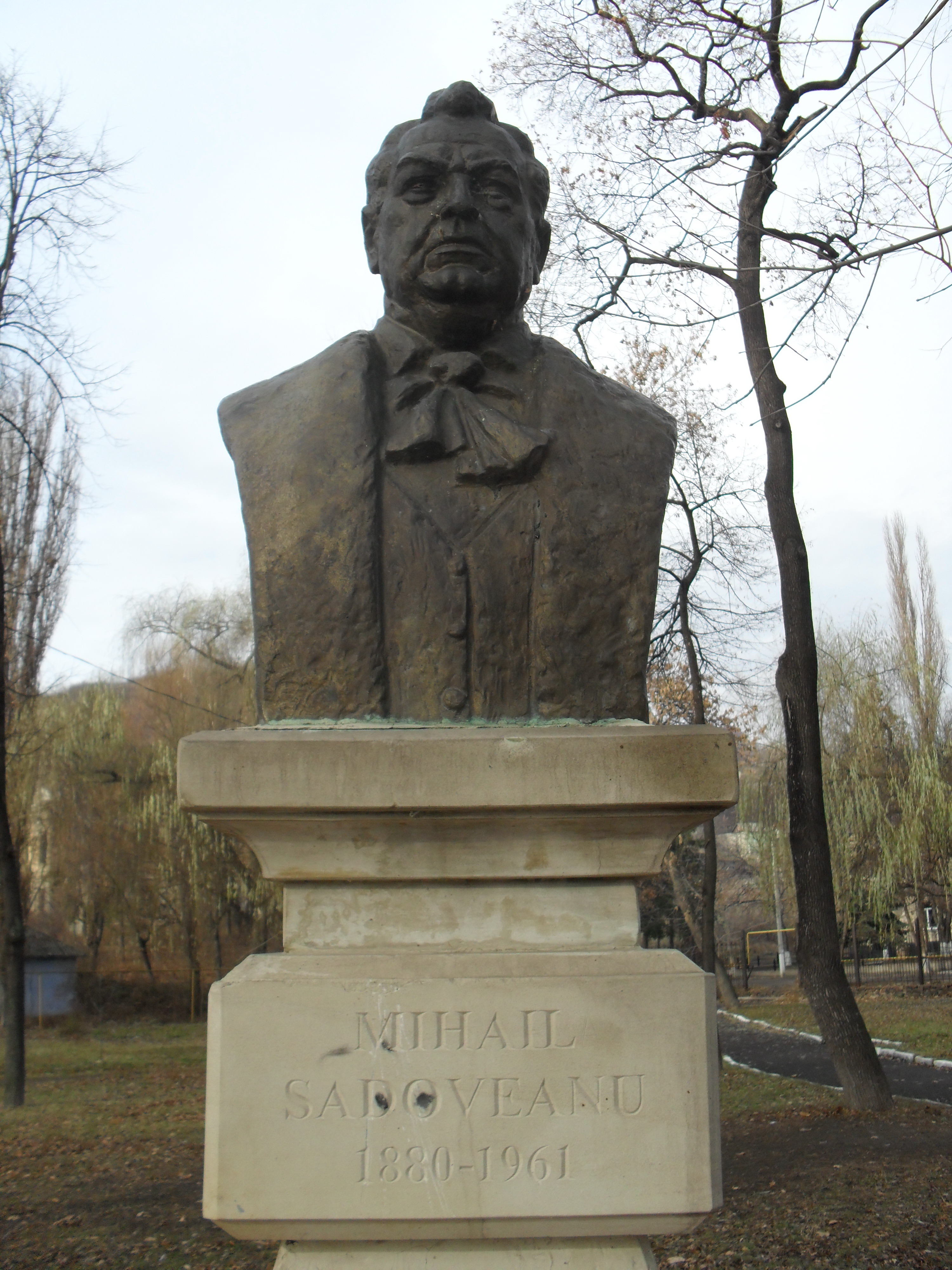 Монумент Михаїлу Садовяну в парку м. Сороки